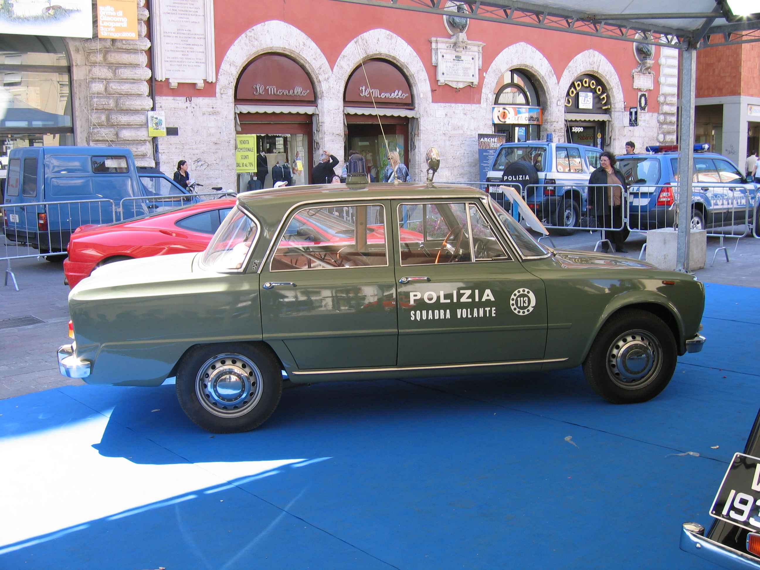 Italian police "Pantera" Alfa Giulia Super, 1971